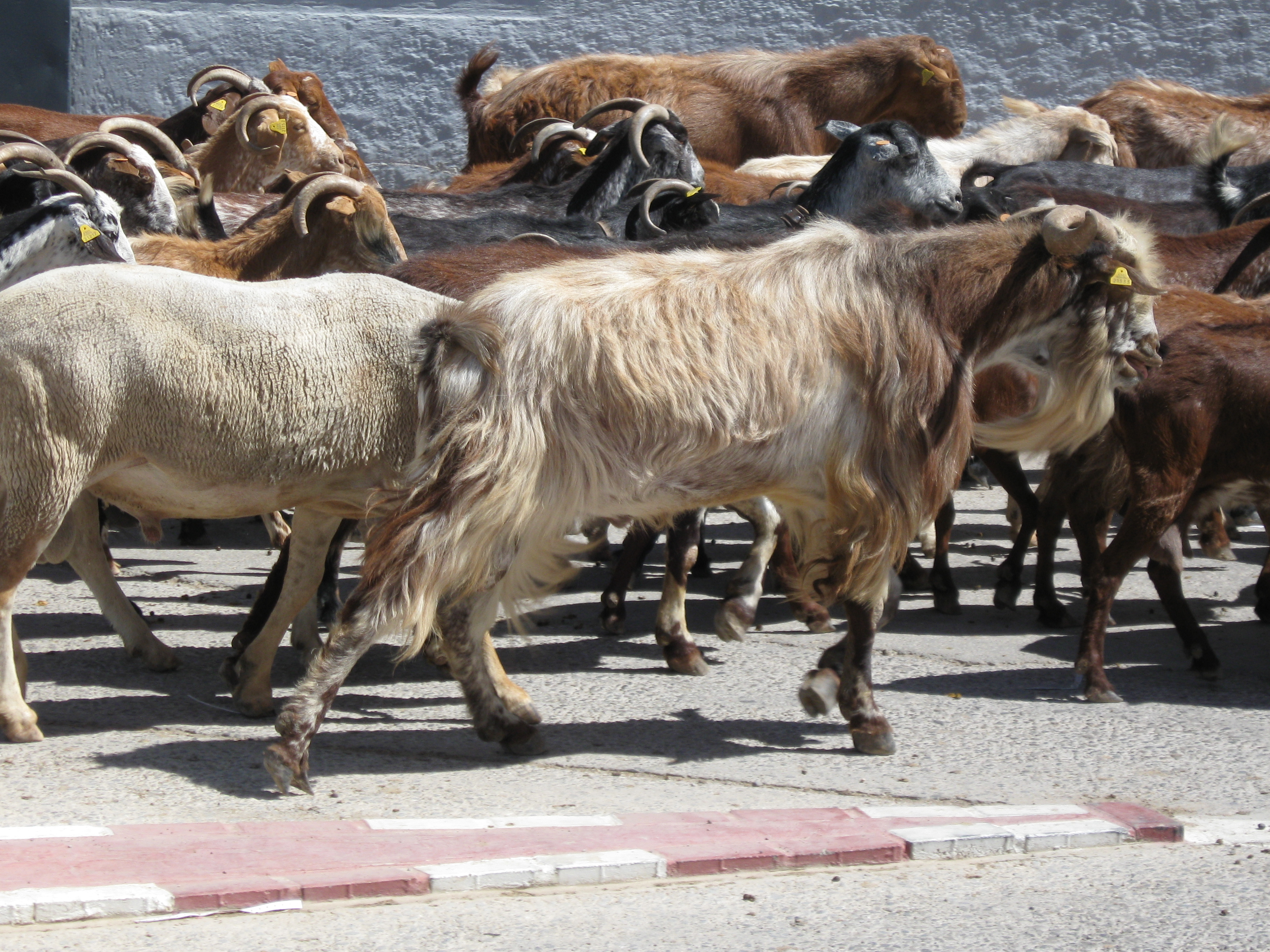 Goats herd in Almargen, Málaga, Spain.